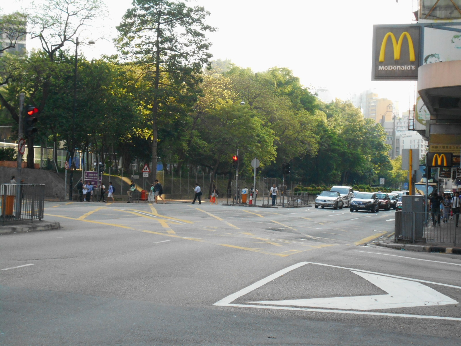 中文（香港）: 窩打老道與梁布房街交界(2016年)